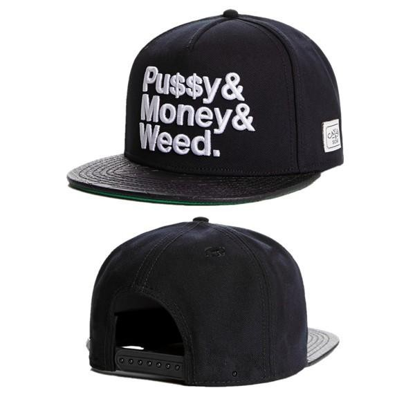 כובע